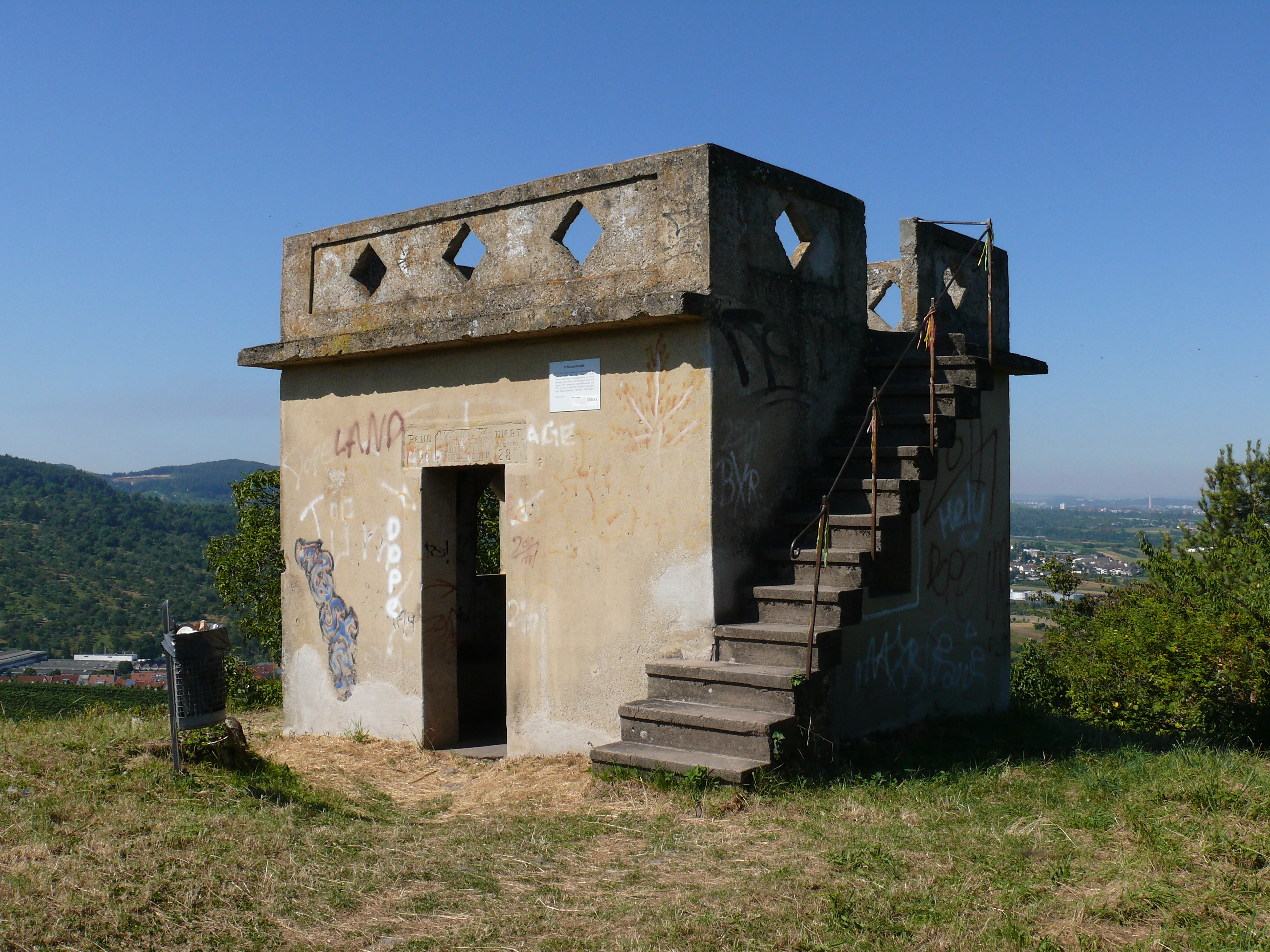 Schützenhüttle in den Weinbergen oberhalb von Weinstadt-Endersbach bzw. -Beutelsbach.